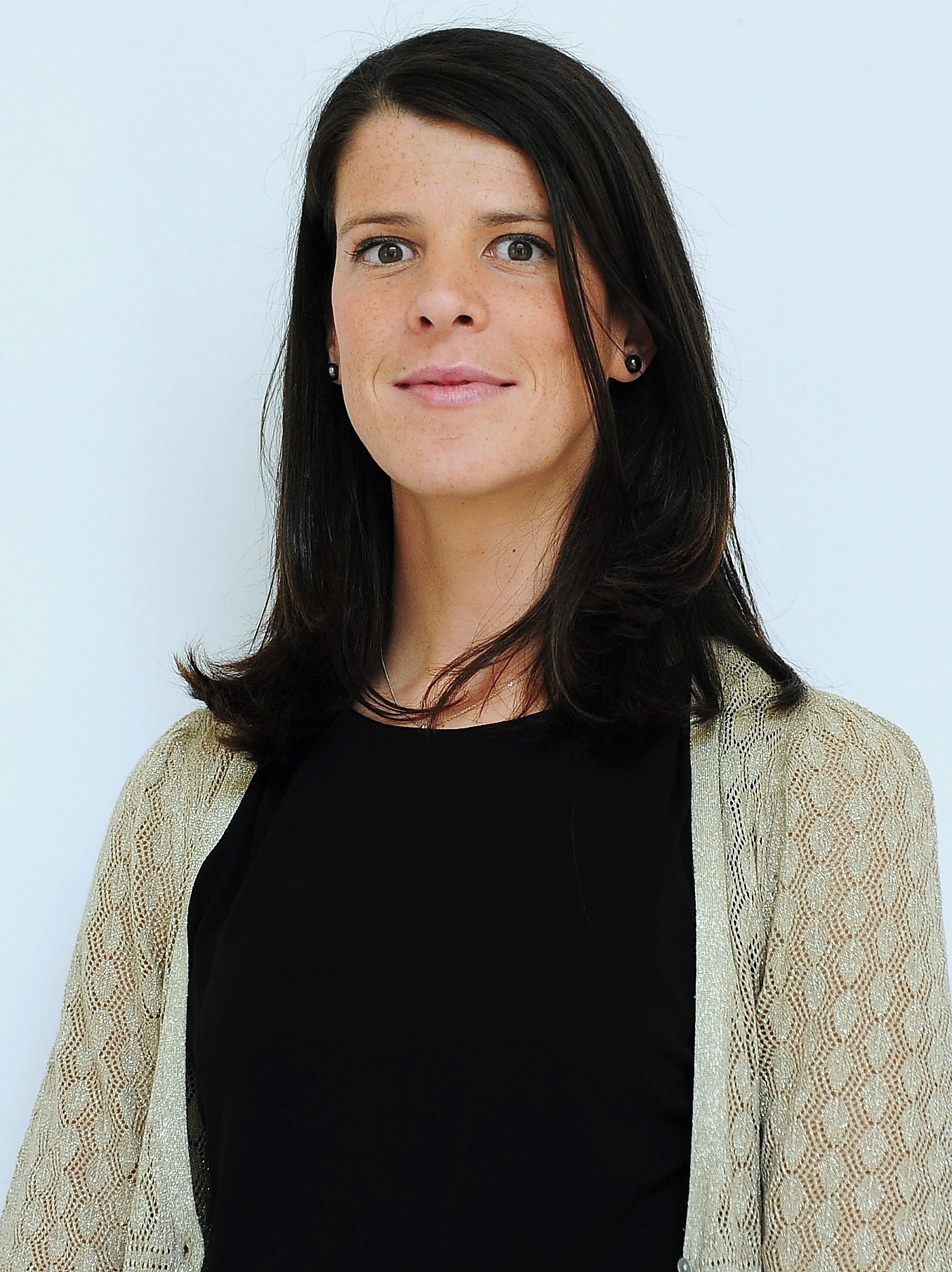 Diputada regional y secretaria primera del Parlamento de Cantabria.